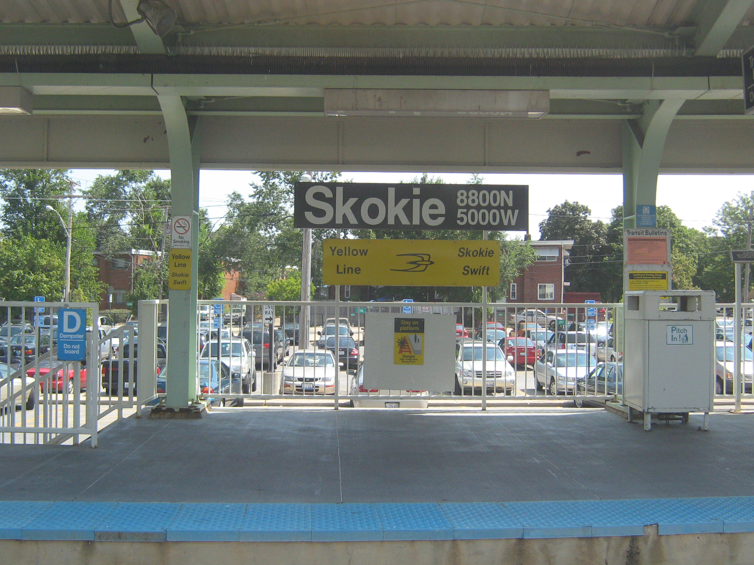 Dempster Street & Terminal Avenue (8800 N/5000 W) 5005 W. Dempster St., Skokie, IL 60077 Yellow Line (Skokie Swift)